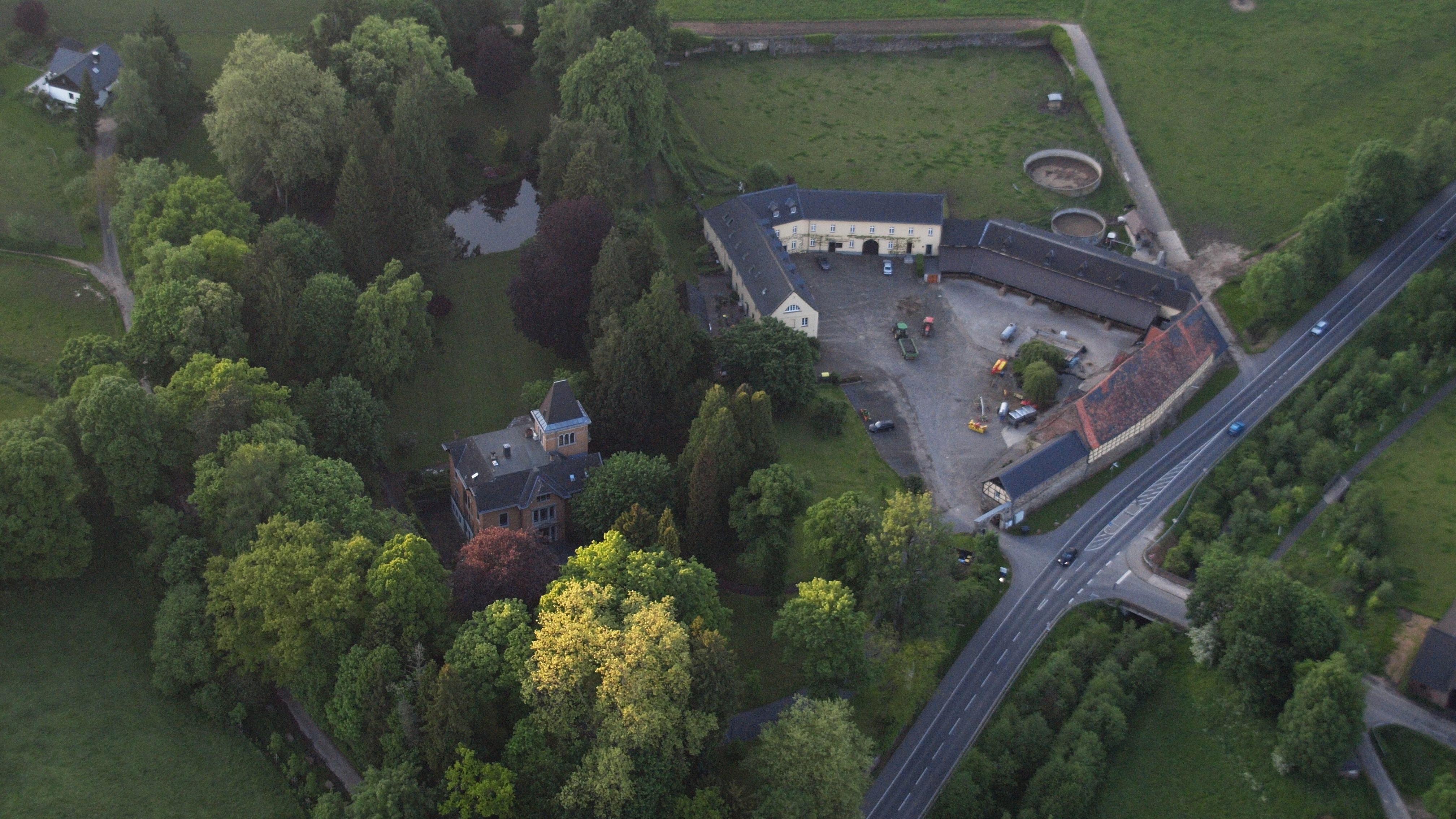 Gut Marienforst, Schweinheim, Bad Godesberg: Luftaufnahme